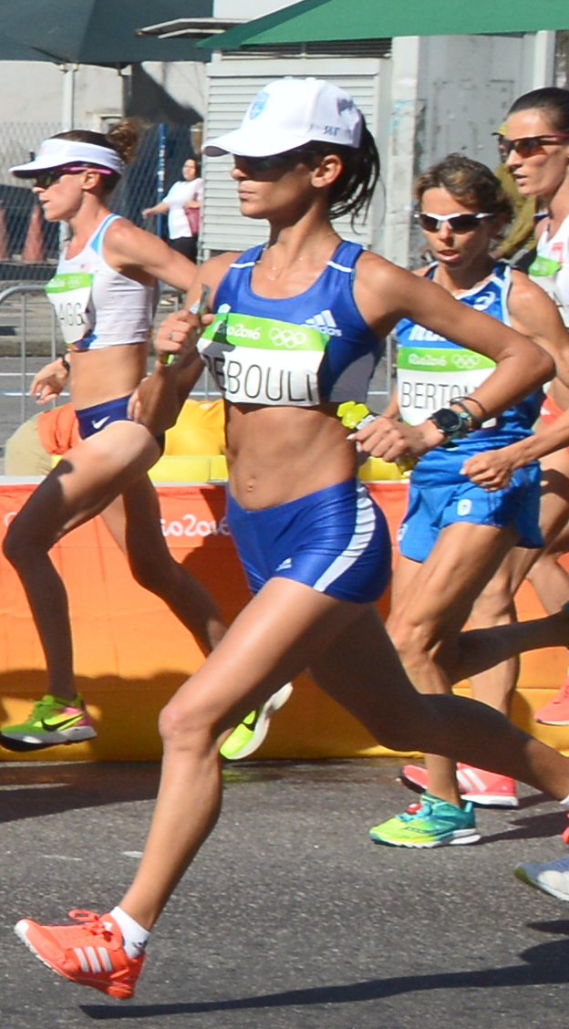 Passage du marathon des jeux olympiques de Rio 2016 dans le centre de Rio